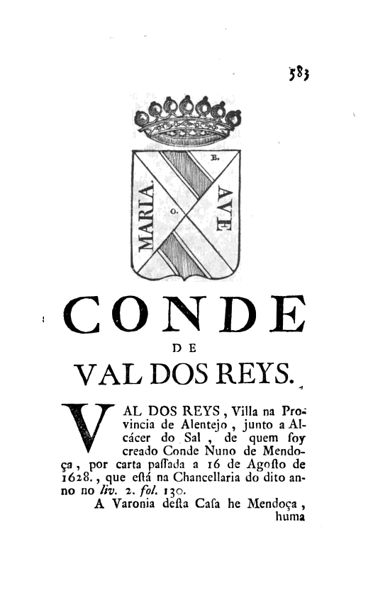 Página 583 das "Memorias Historicas e Genealogicas dos Grandes de Portugal", 3.a edição ― Título de Conde de Vale de Reis